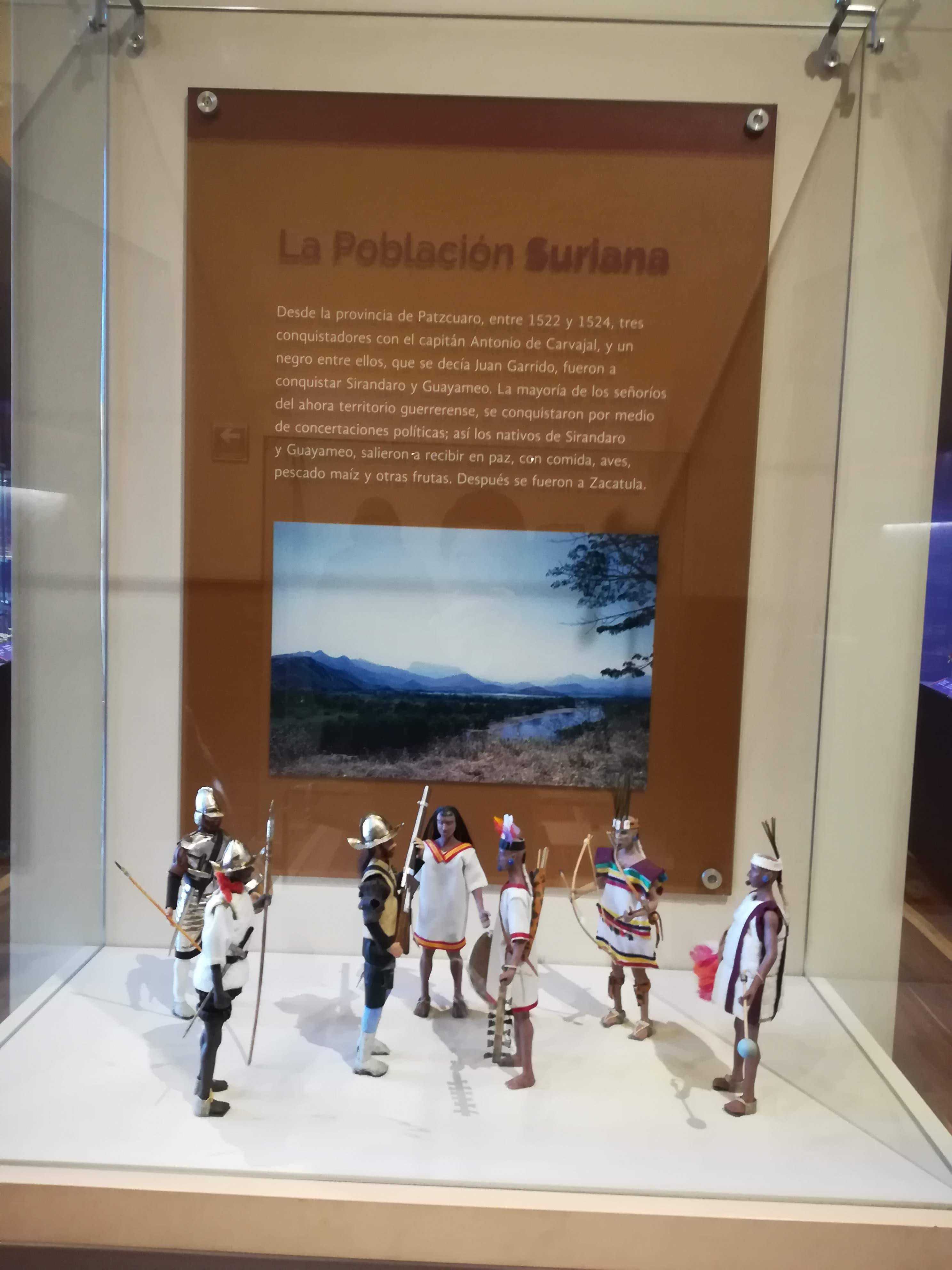 La imagen muestra información referente a la población del sur del actual territorio de México, enfatizando en dos localidades: Zirándaro y Guayameo, pertenecientes al estado de Guerrero.